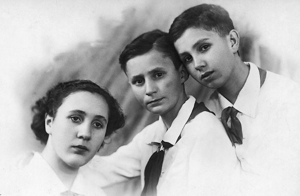 Слева направо, Кармен, Карлос и Вирхилио, 1941 год